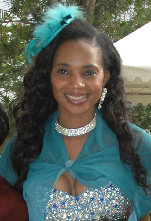 L'artiste Lady Ponce au palais de l'Unité après la présentation des voeux à Mme Chantal Biya, en 2012